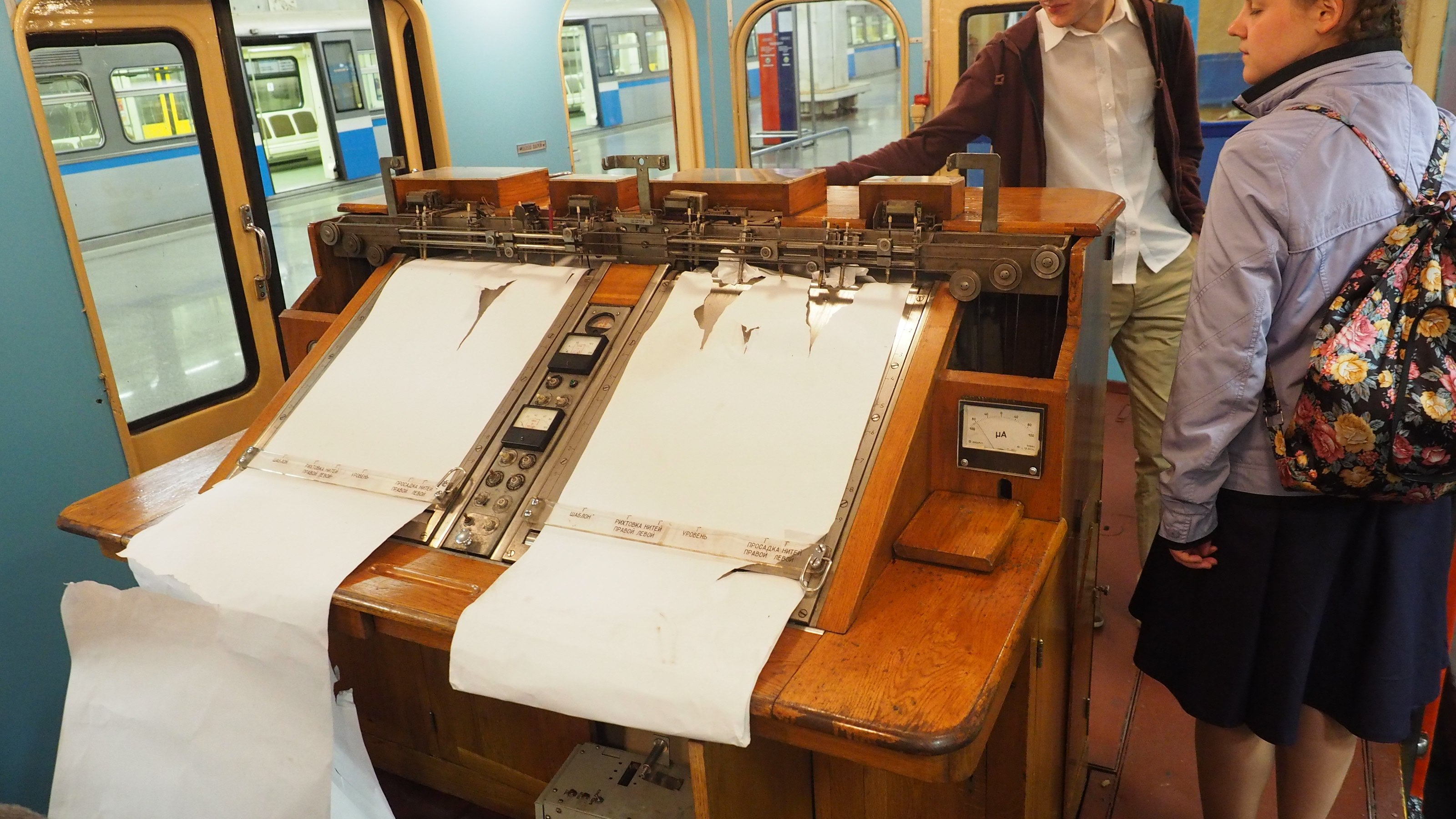 Музейный метровагон УМ5 806. Выставка подвижного состава и парад поездов к 80-летию Московского метрополитена 15 мая 2015 года. 15 and 16 may of 2015 Moscow Metro celebrating 80 years of operation. There is a for frist time exibition of recently restored historic cars at siding track of Partizanskaya station. 15 и 16 мая 2015 в Москве отмечалось 80 лет Московскому метро. Впервые была устроена выставка исторических вагонов. Они были расставлены на 3 пути станции Партизанская.